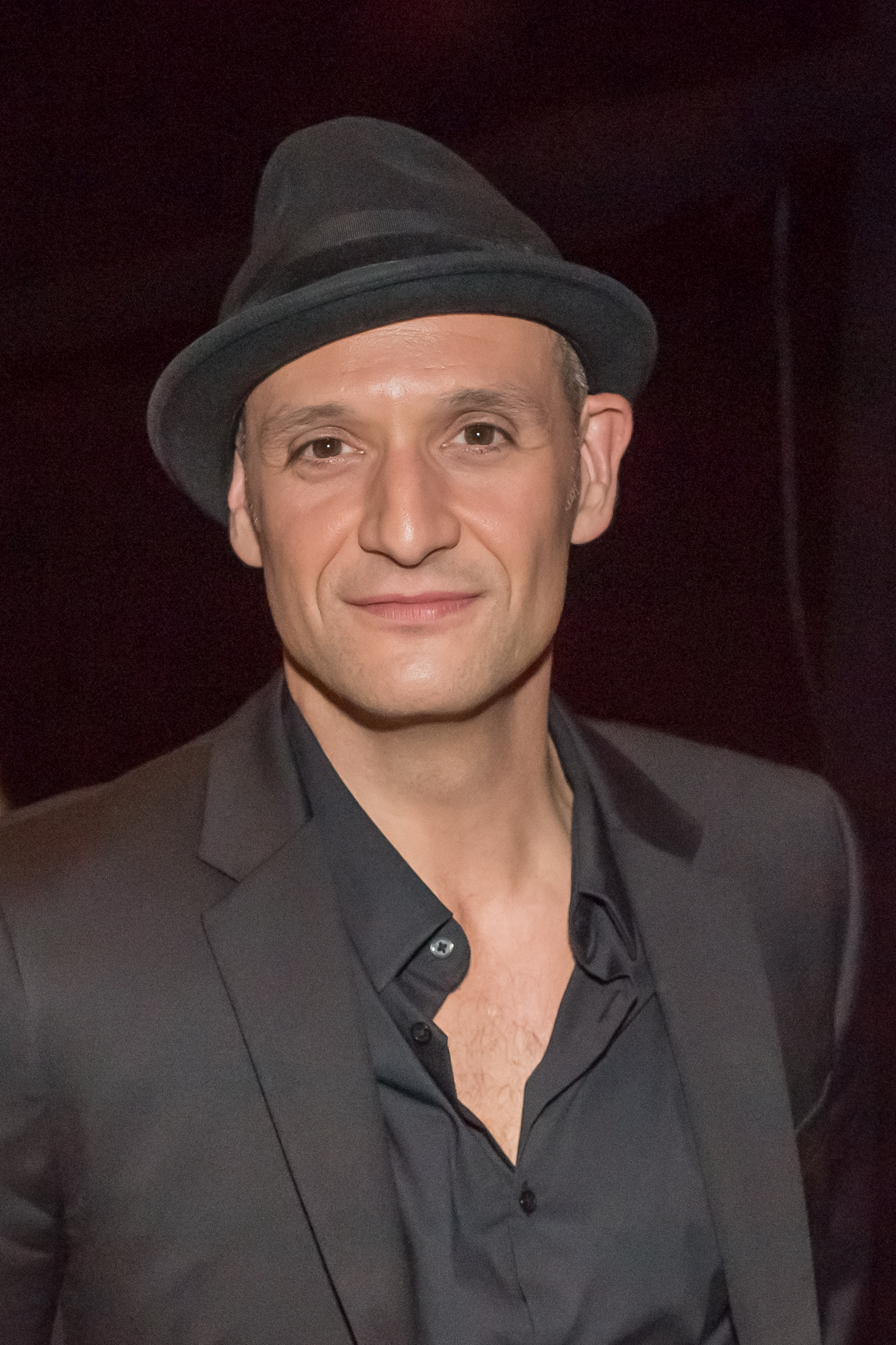 Wien, 10. Mai 2019: ORF Dancing Stars, Finale - Bild zeigt Sänger Drew Sarich.